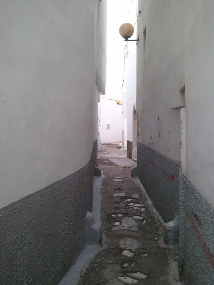 Piccola strada nel centro storico di Turi.